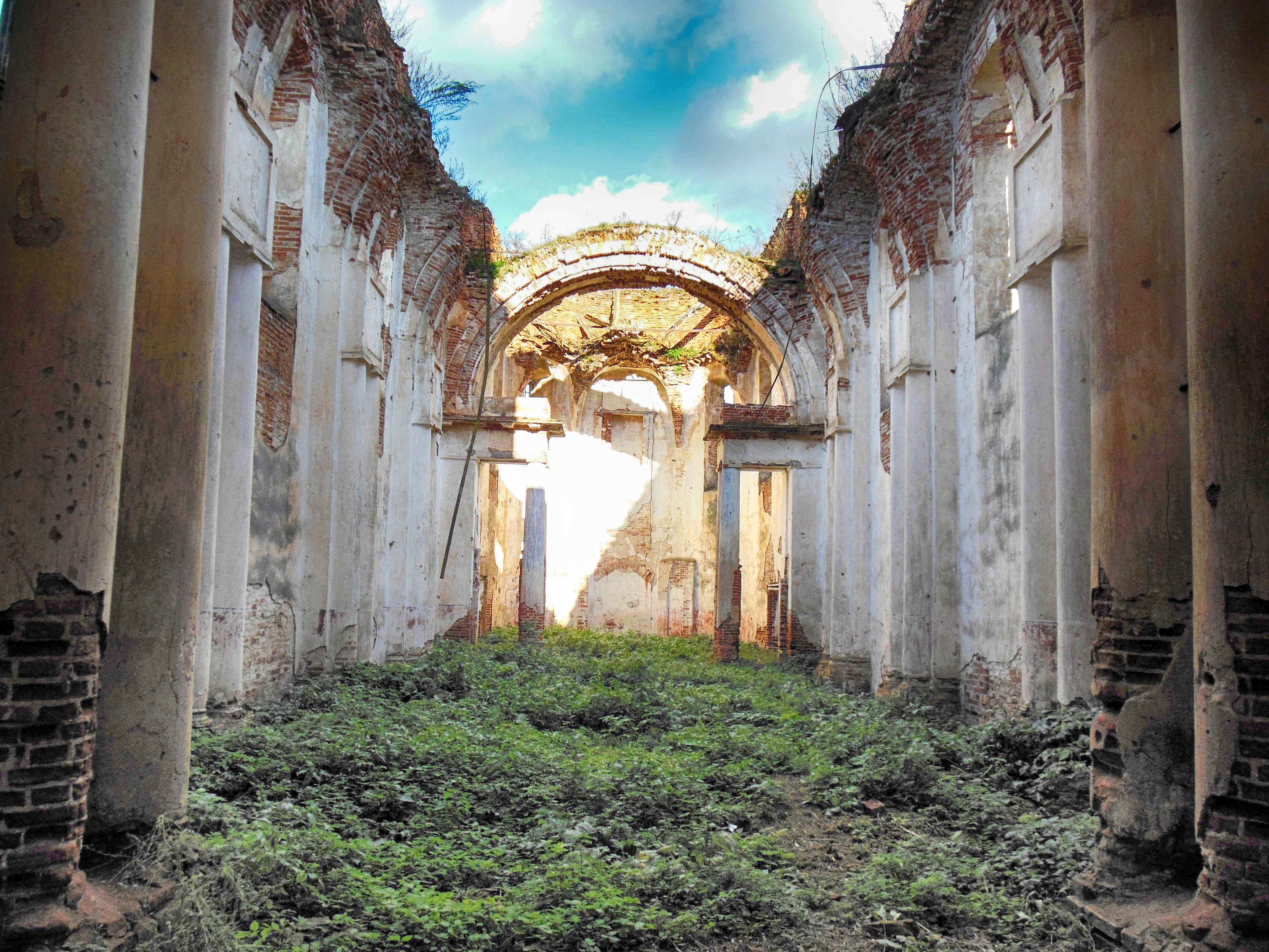 Беларуская (тарашкевіца): Царква. в. Сялец (Ануфрыева) This is a photo of Belarusian heritage monument. Reference number: 512Г000518 ( WLM)